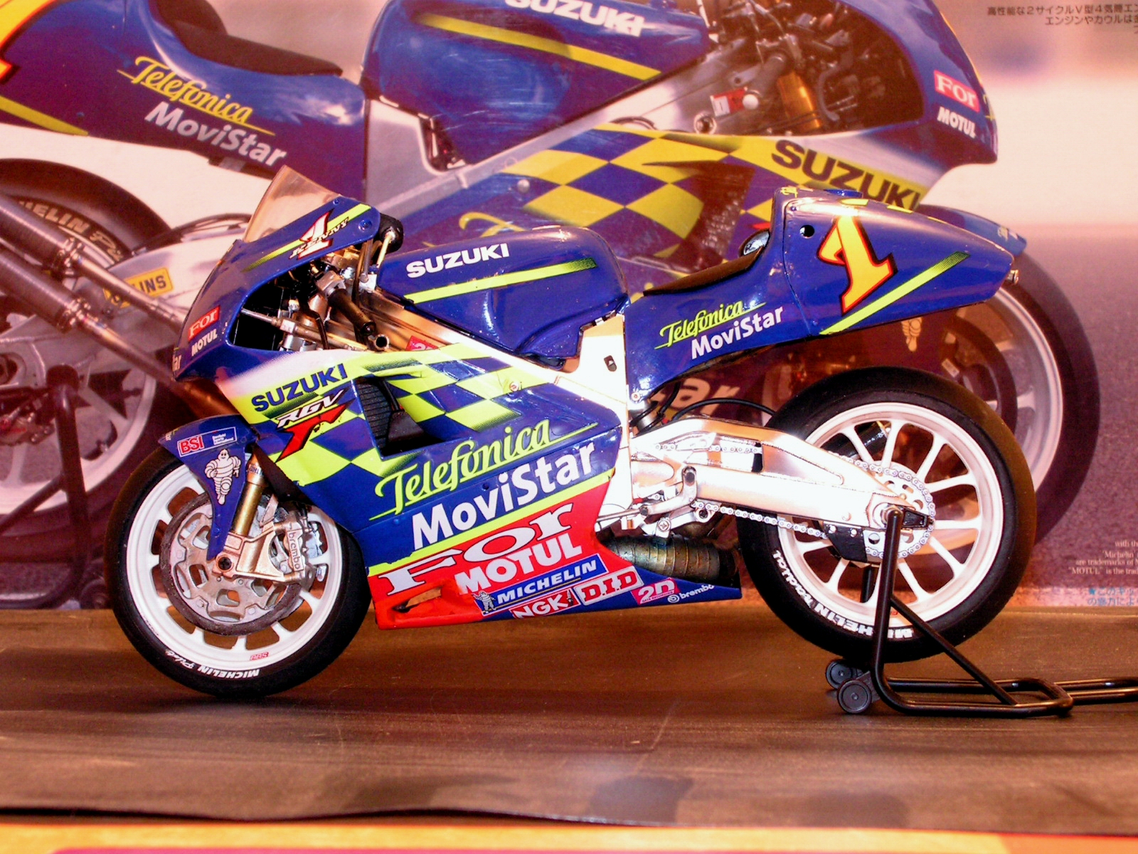 maquette tamiya 1.12 Suzuki GSV500 Kenny Roberts Jr 2001